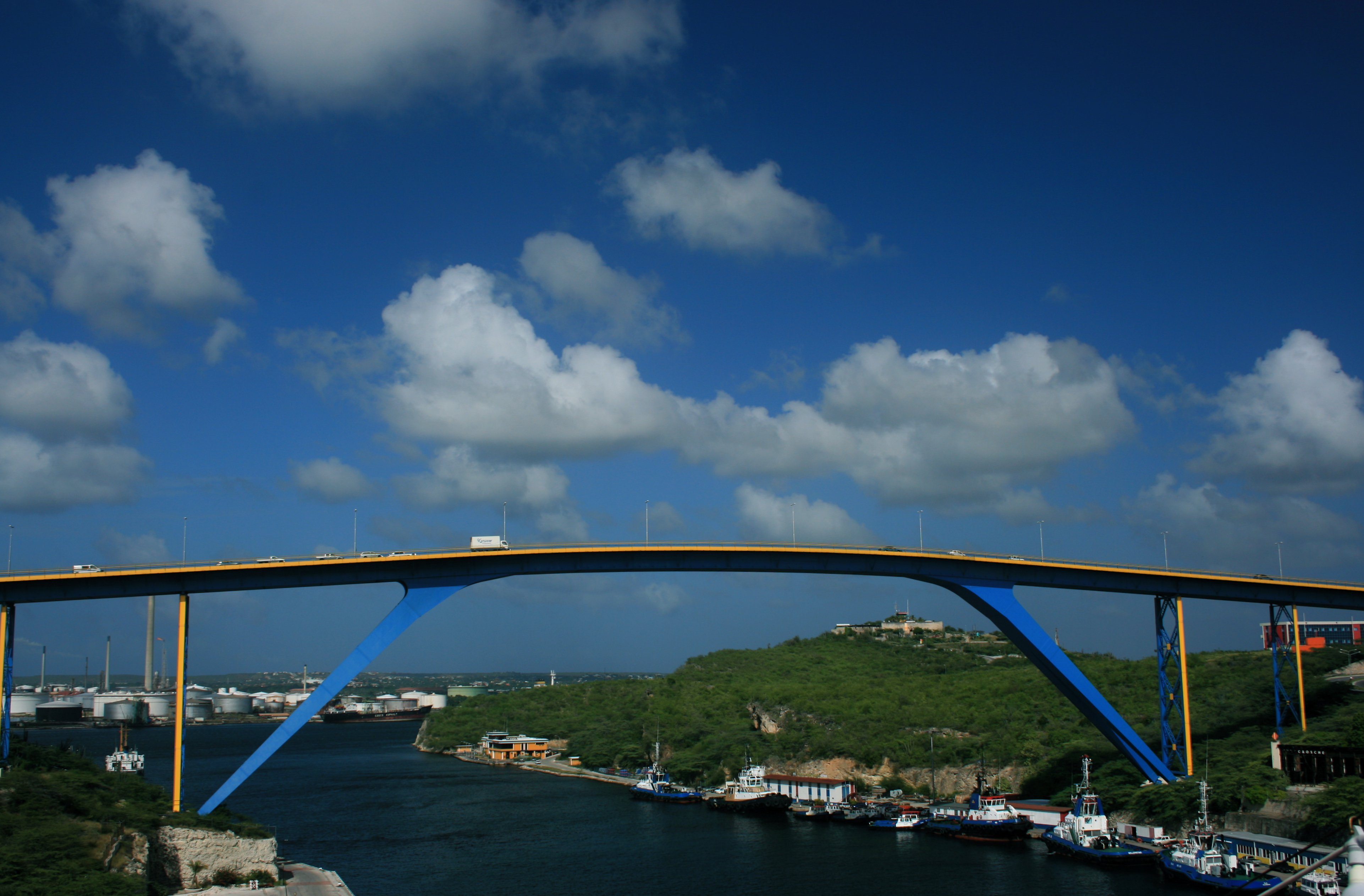 Puente Reina Juliana sobre la bahía y puerto natural de Curazao.